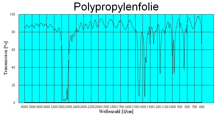 Polypropylen-Folie, ca. 38 µm dick mit Interferenzen